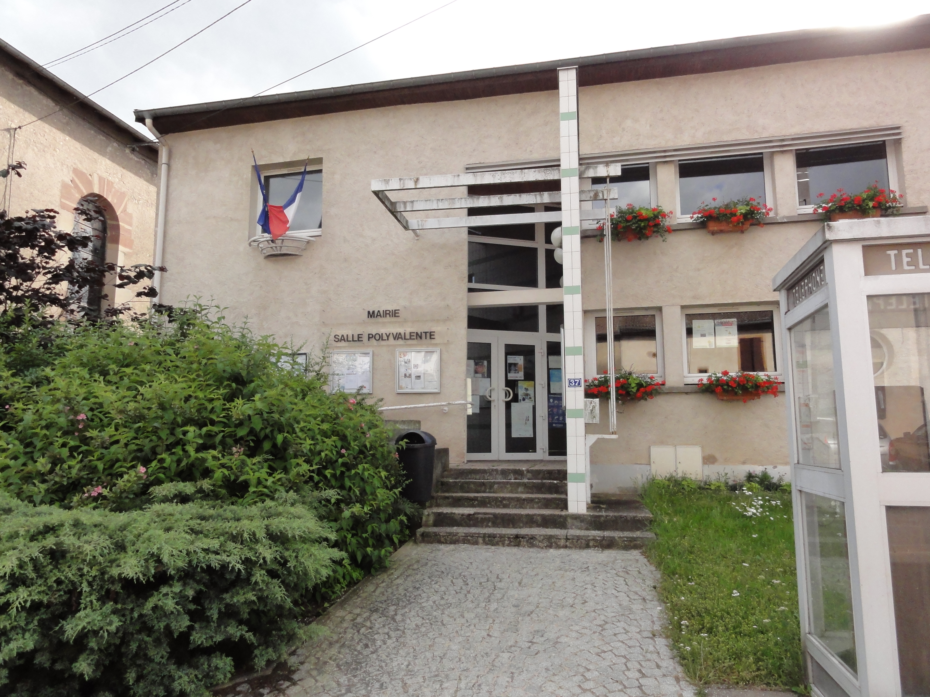 Laronxe (M-et-M) mairie